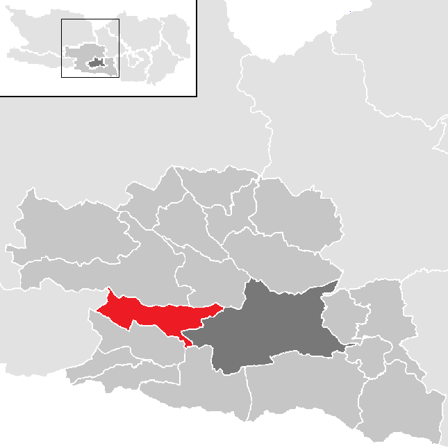 Bezirk Villach-Land